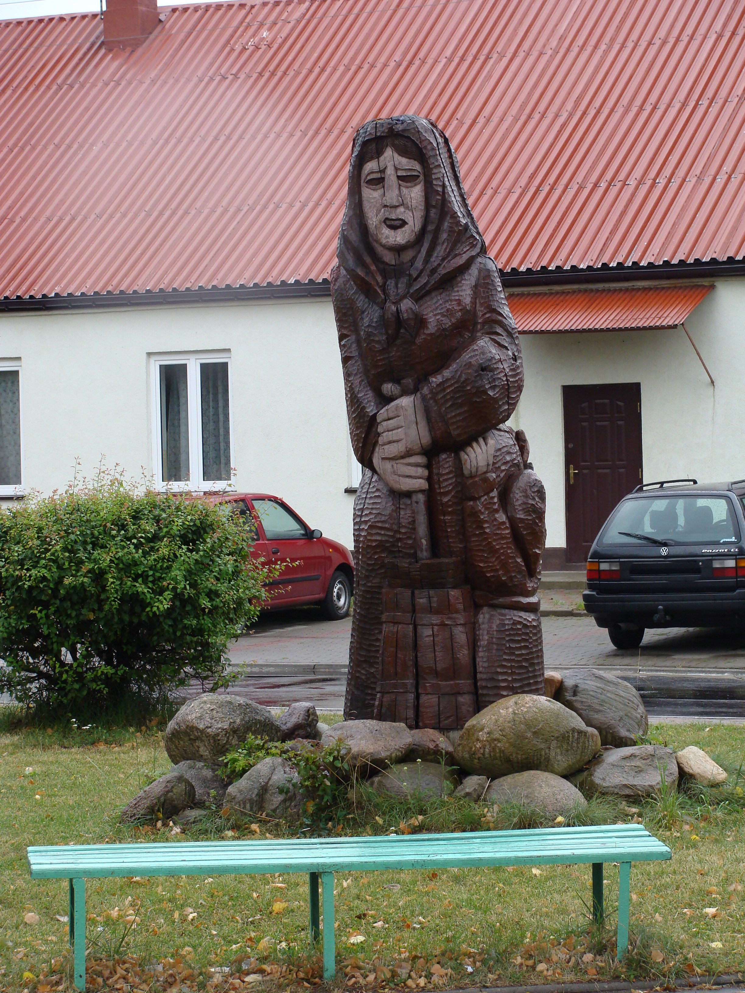 Baba z maselnicą - ludowa drewniana rzeźba na placu miedzy kościołem a OSP w Fałkowie